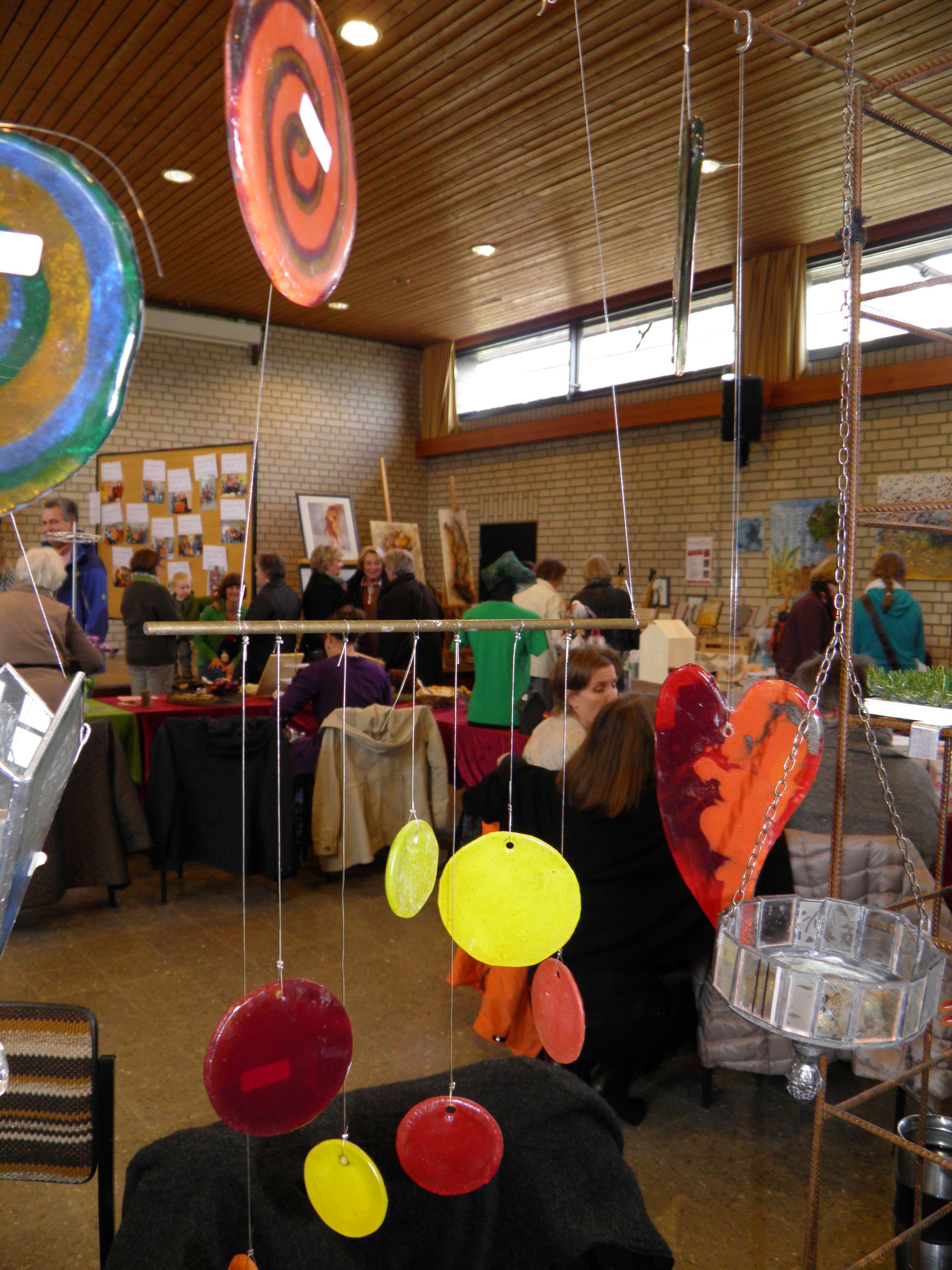 Ausstellung